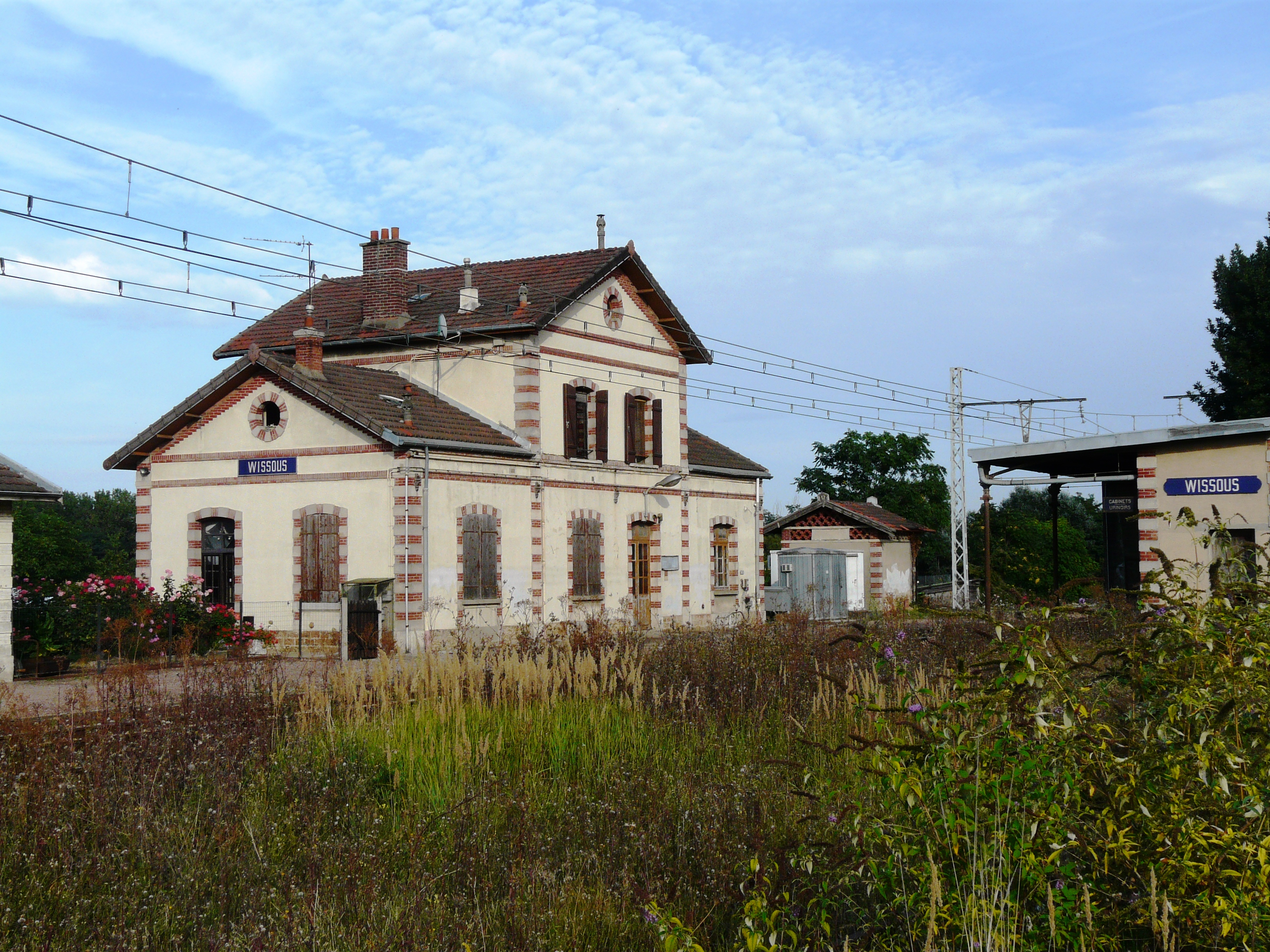 Gare de Wissous (désaffectée)